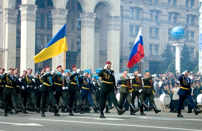 Парад перемоги, Київ.